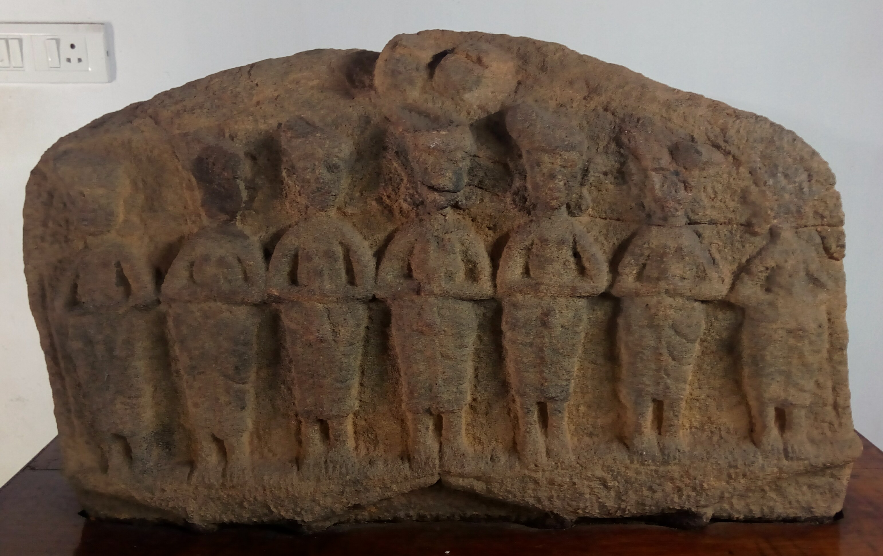 Sapthamathrukkal Krishnapuram Palace